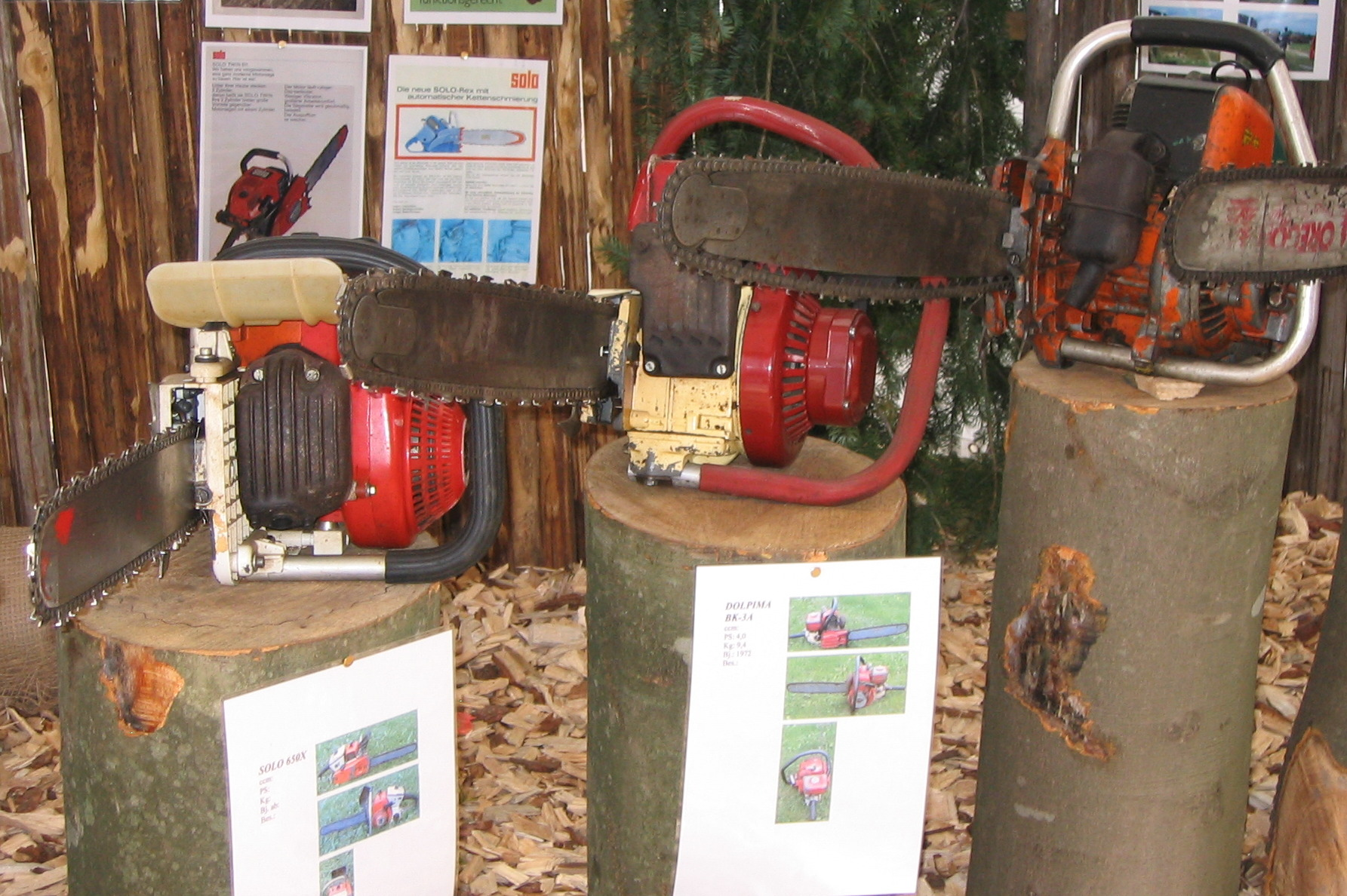 Chainsaws auf dem Festival Staufen Stages am Stand der Klaus Bärmann GmbH: Solo 650 X Dolpima BK-3A (polnischer Hersteller aus Breslau Dolmar??? Dolmar CC...